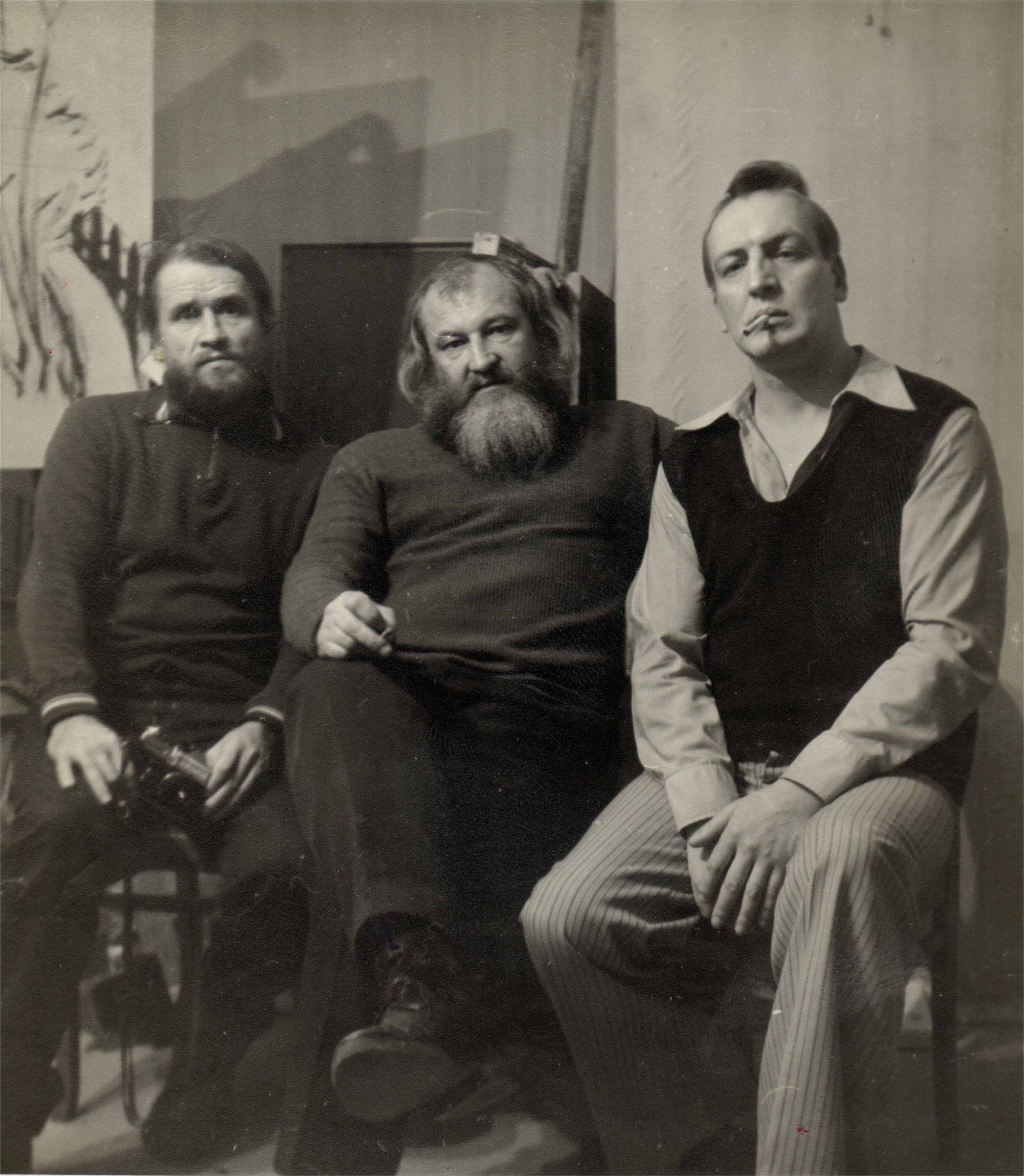 Художники Владимир Лещенко, Александр Жданов, Леонид Стуканов. Москва, 1984 г.